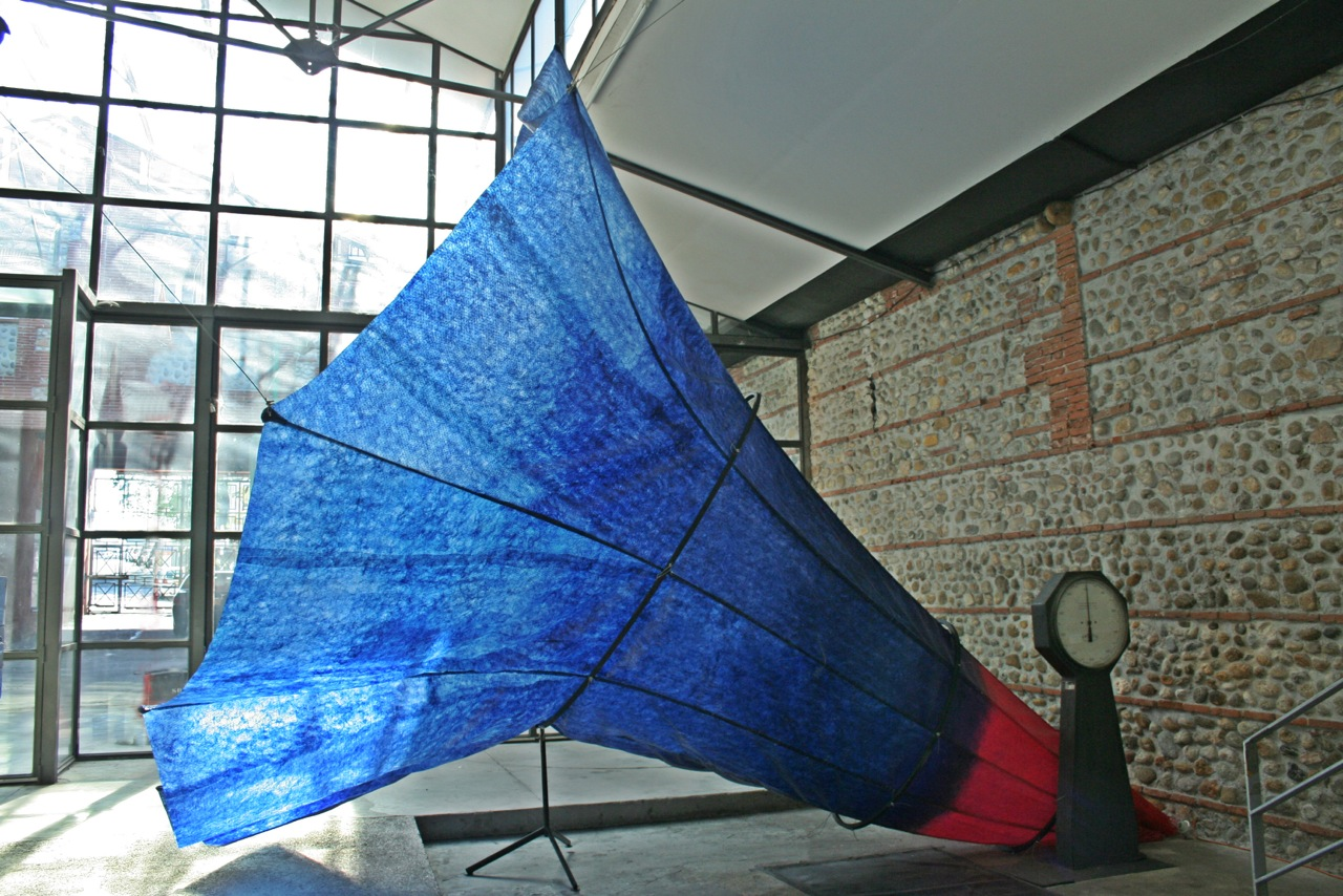 Fotografía de Gran Hermana, escultura/Intervención. Fibra de vidrio, nylon, hierro y pasta acrílica. 5,1 x 5,1 x 5, 6 m.